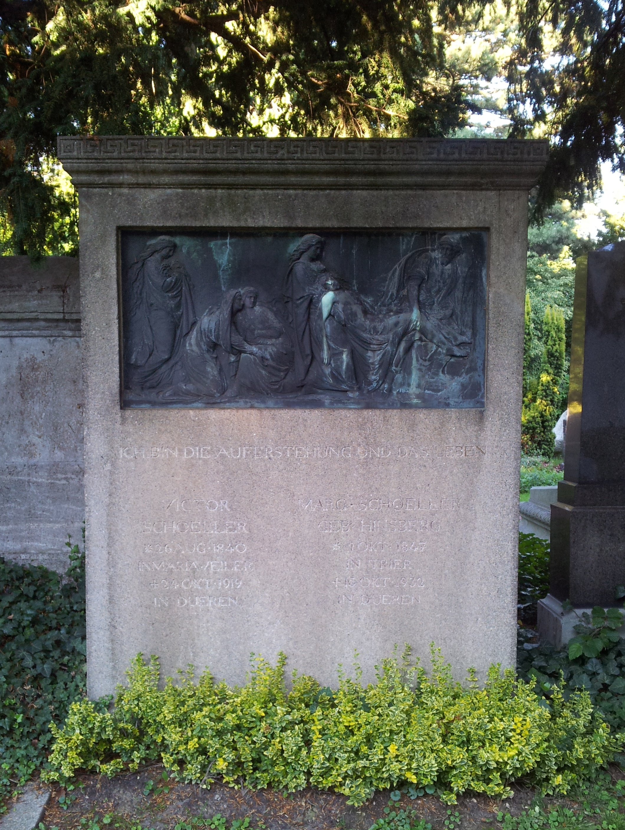 Baudenkmal: Grabmal Victor und Margarethe Schoeller in Düren